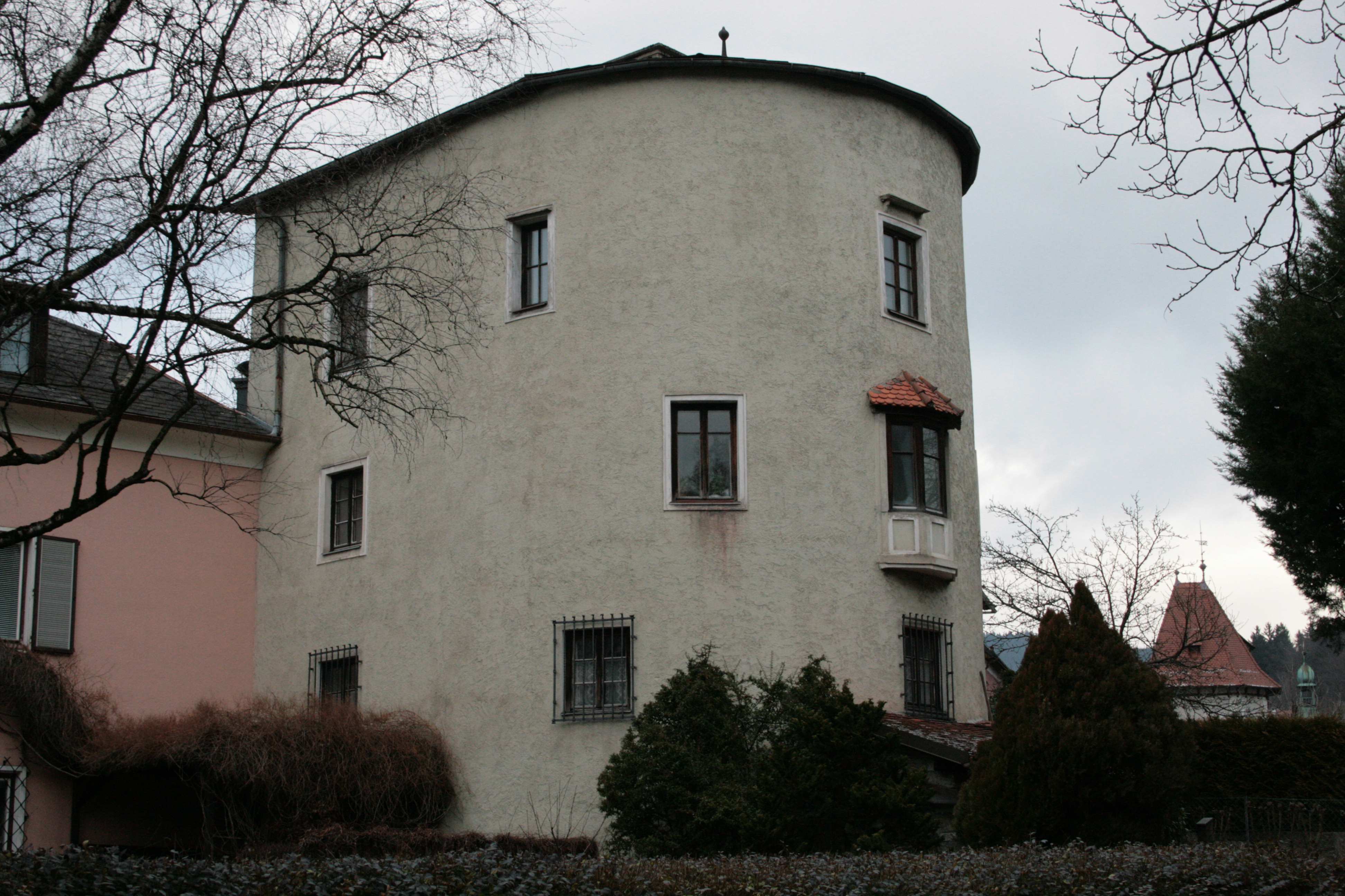 Waidhofen an der Ybbs, Graben, Lachentturm